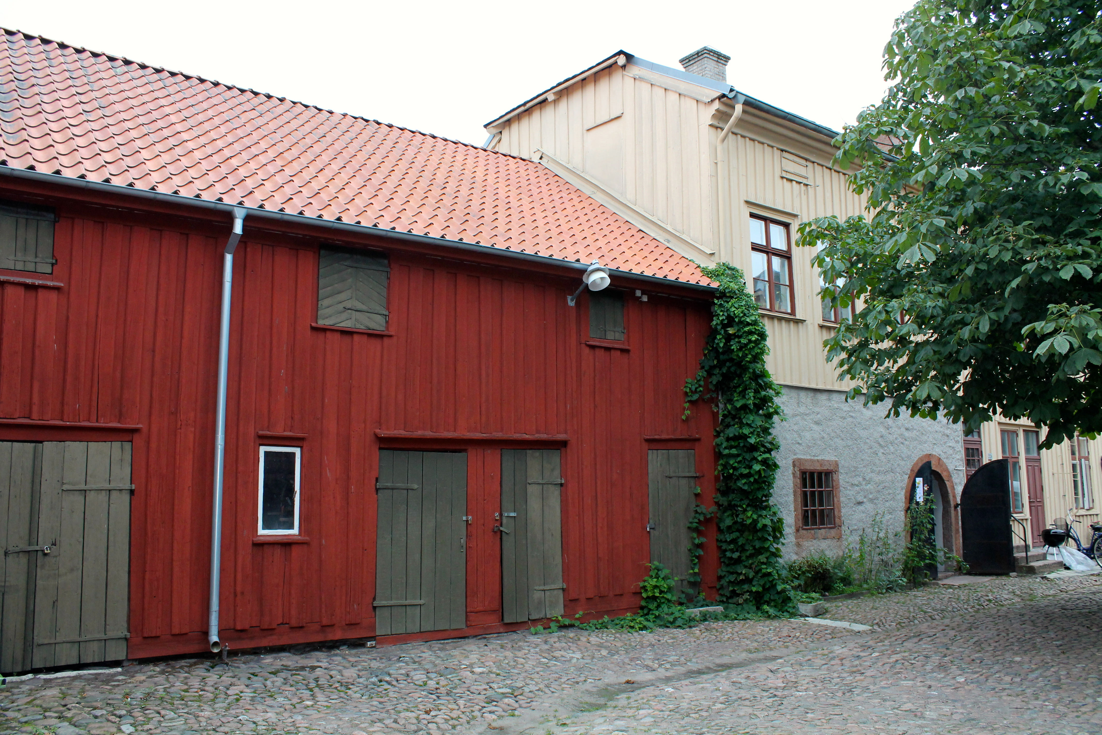 Schougska handelsgården (Ottar 1-2)